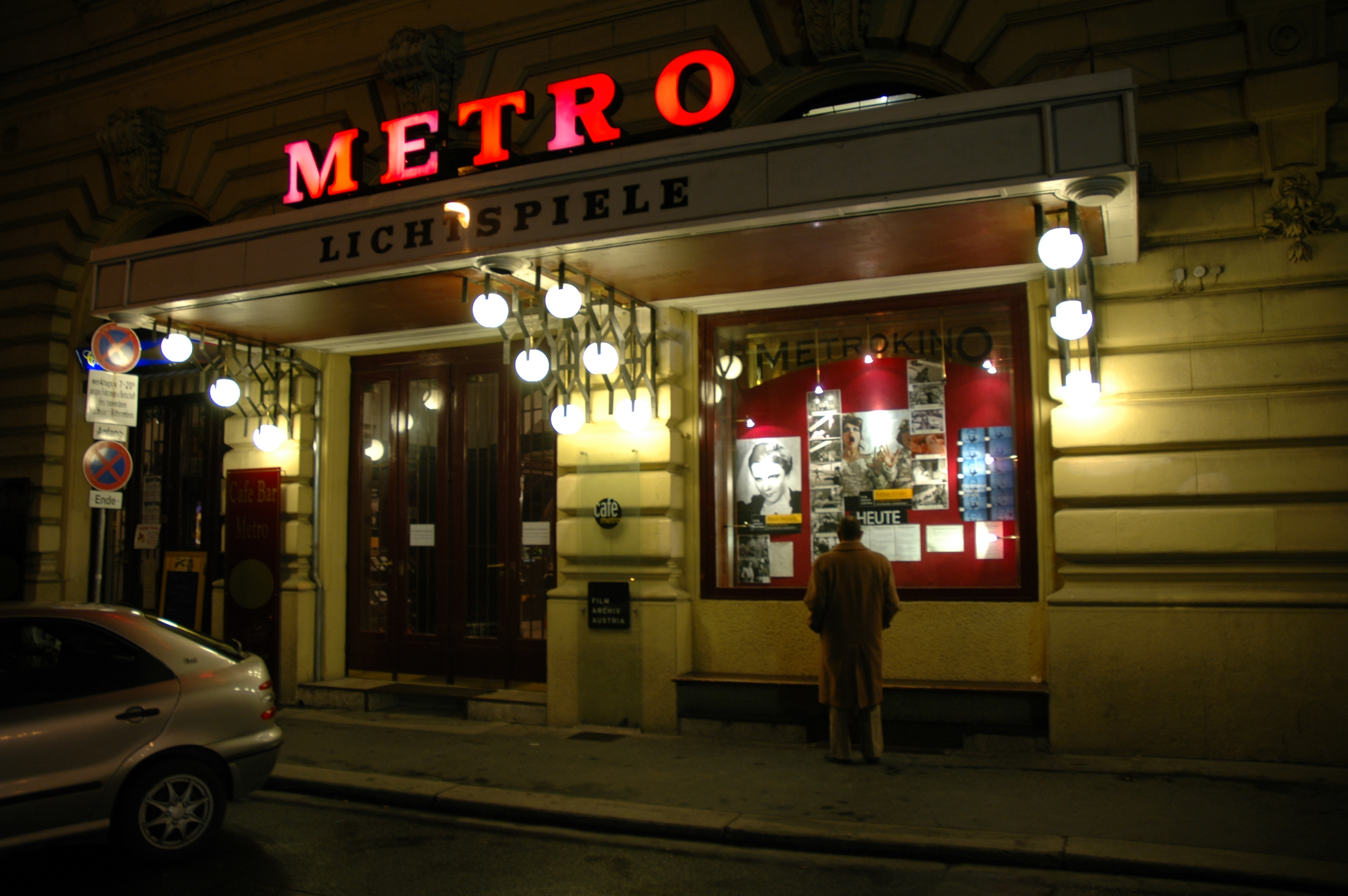 Metro Kino des Filmarchivs Austria in Wien I, Johannesgasse 4